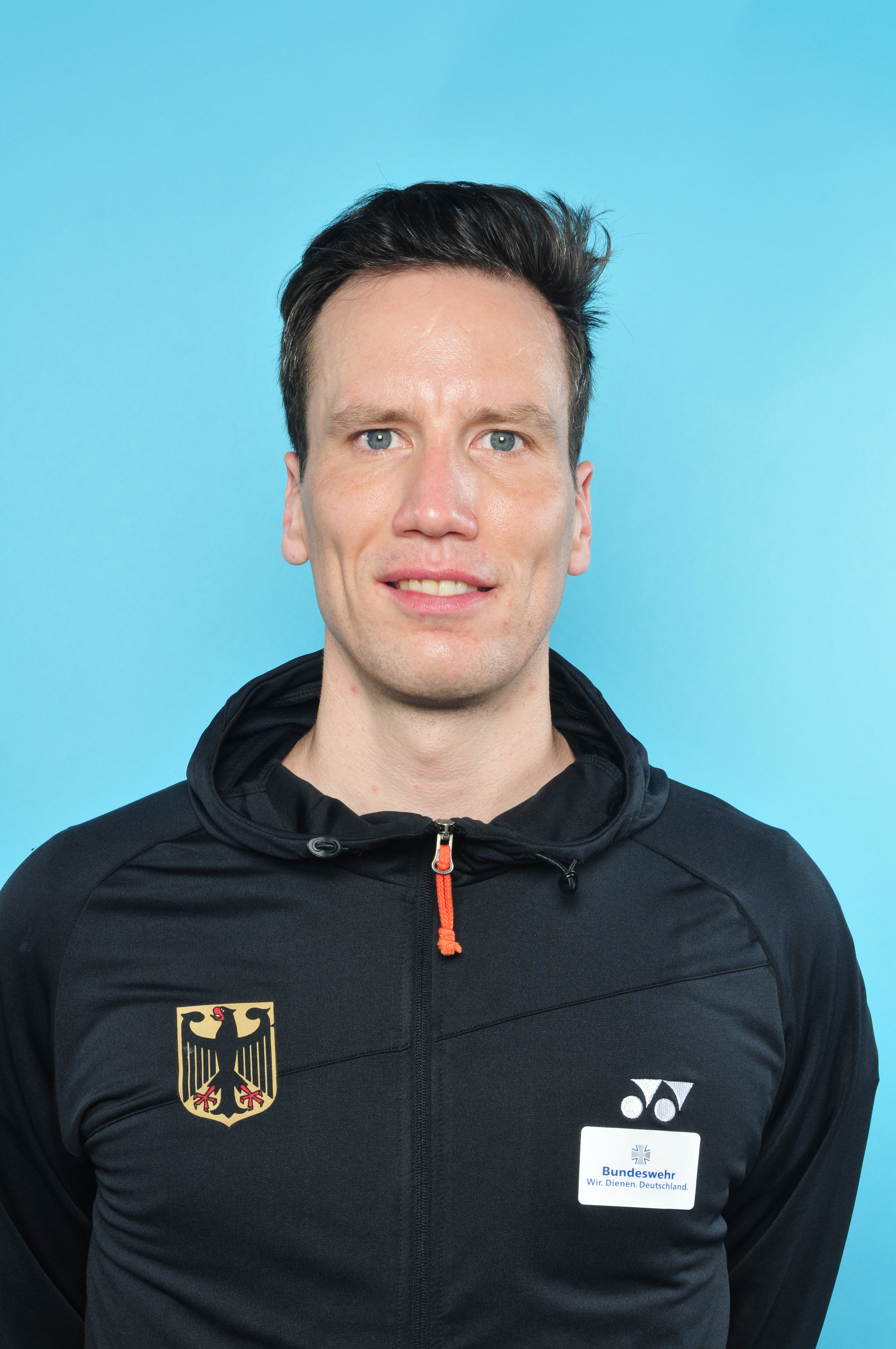 Einkleidung der deutschen Olympiamannschaftam 28. Juni 2012 in Mainz - Olympische Sommerspiele 2012 Cirdan Marcus Cyron Olaf Kosinsky Ralf Roletschek Sven Teschke